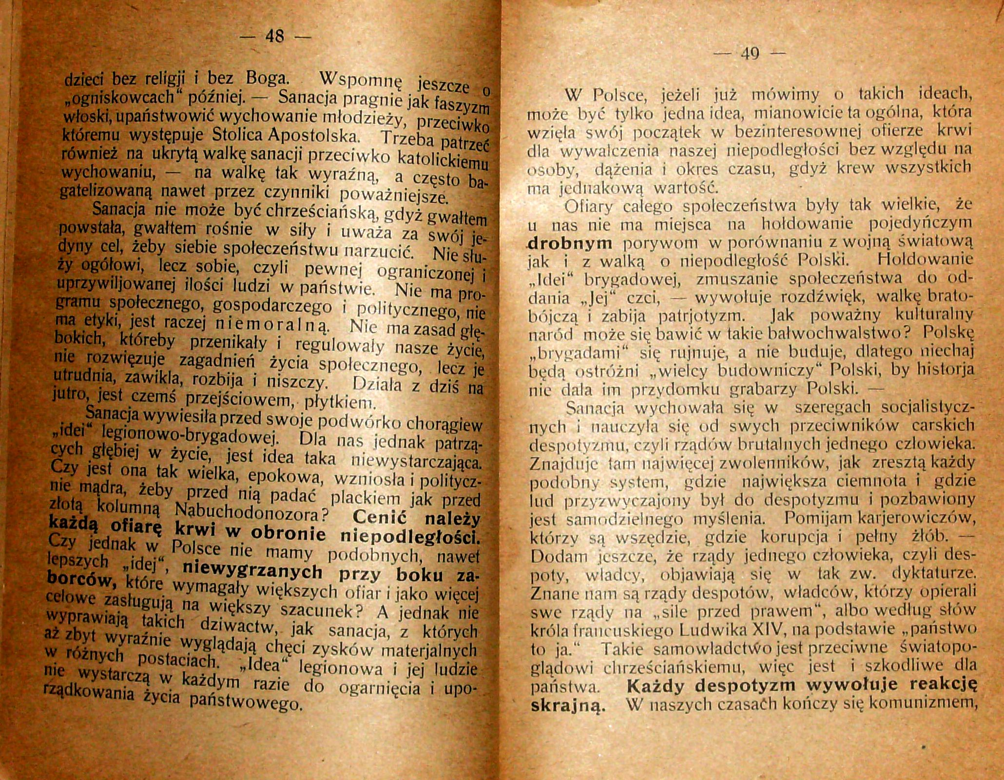 Stanisław Krzyżowski, Rozmyślania w czterdziestą rocznicę encykliki „Rerum novarum”, wydanej 15 maja 1891 r. przez papieża Leona XIII, Pszczyna 1931